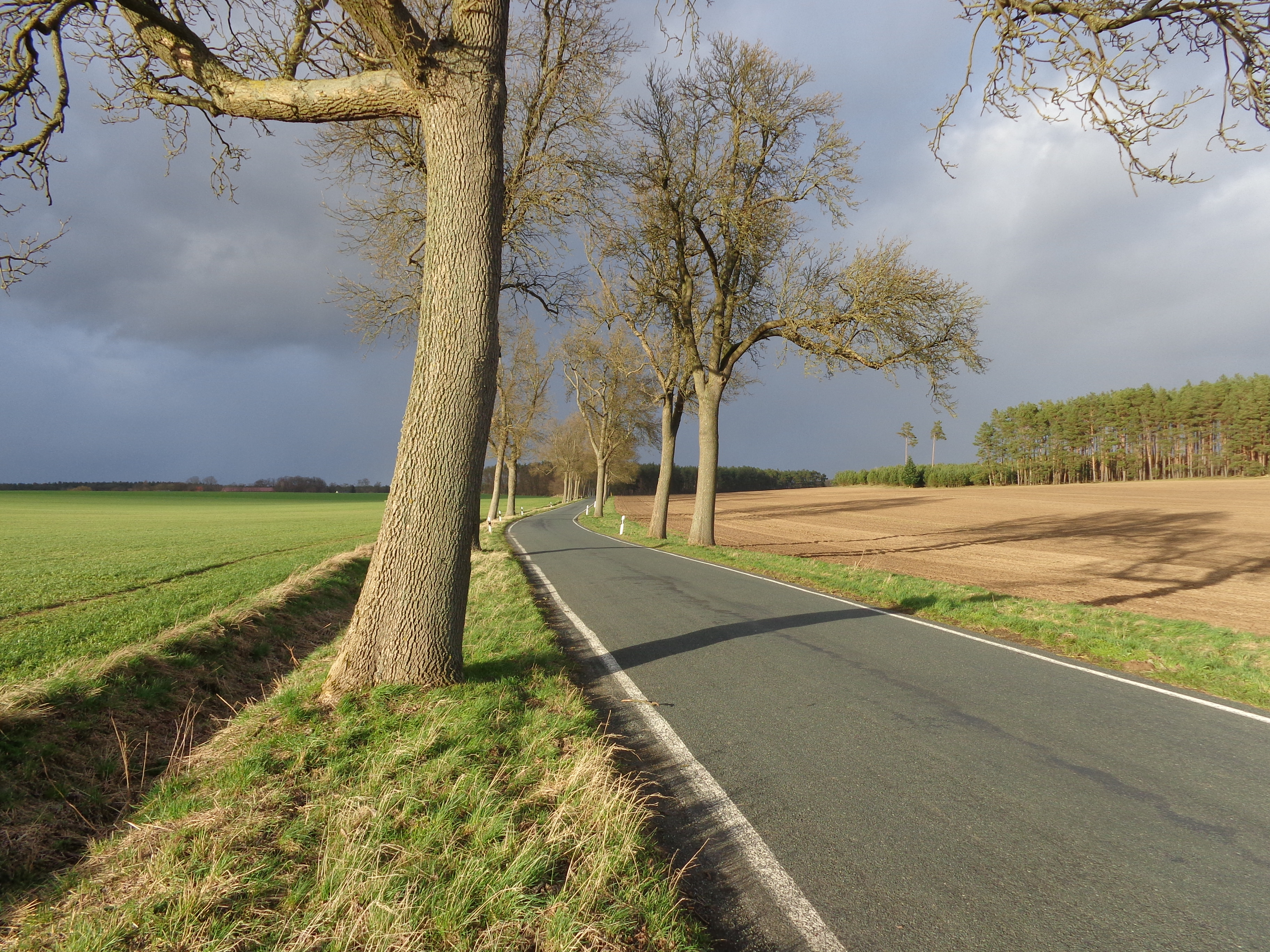 Kreisstraße südlich von Gramzow (Perleberg)